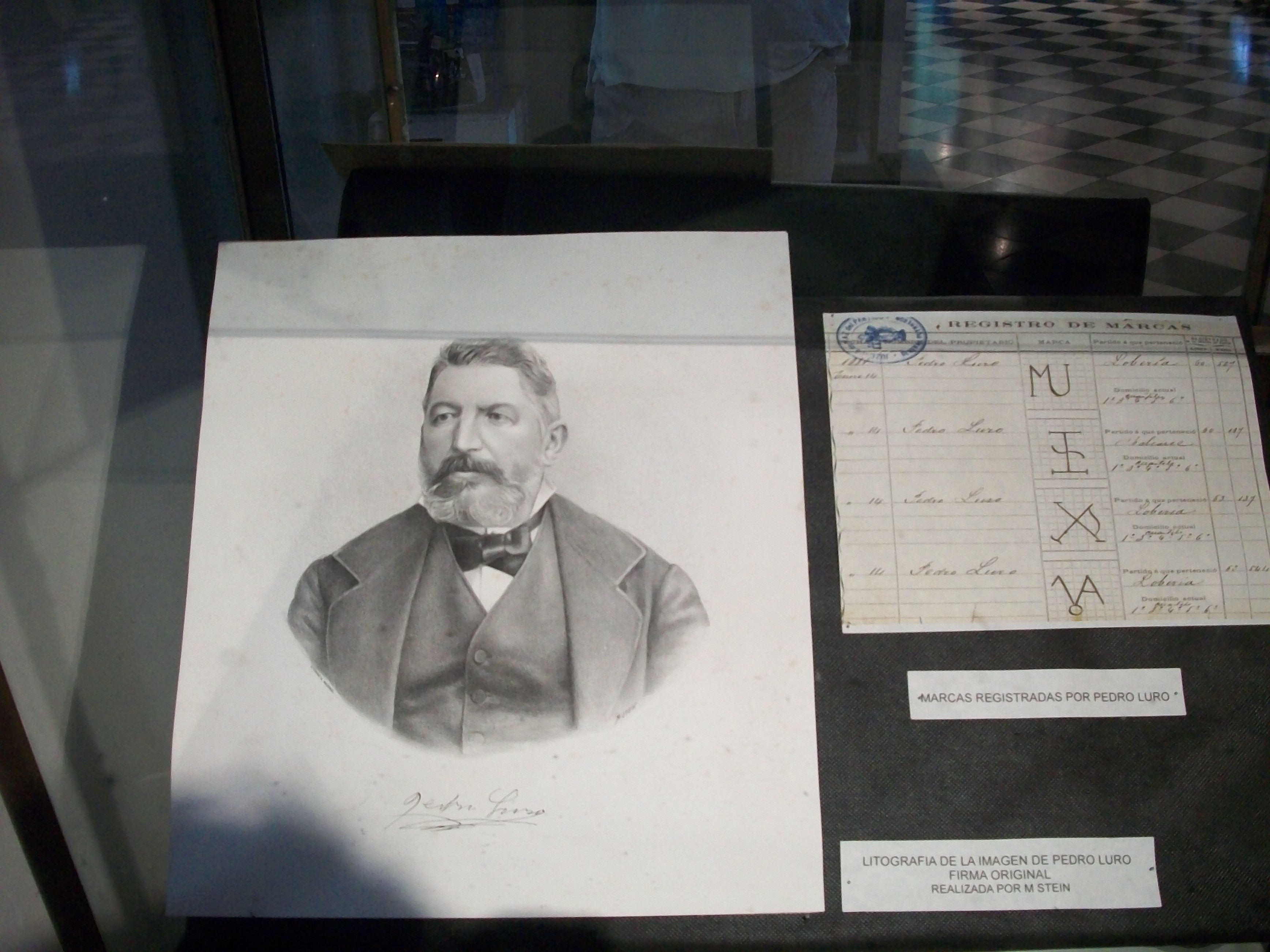 Museo Histórico Municipal Don Rodolfo T. Barili, Mar del Plata, Argentina